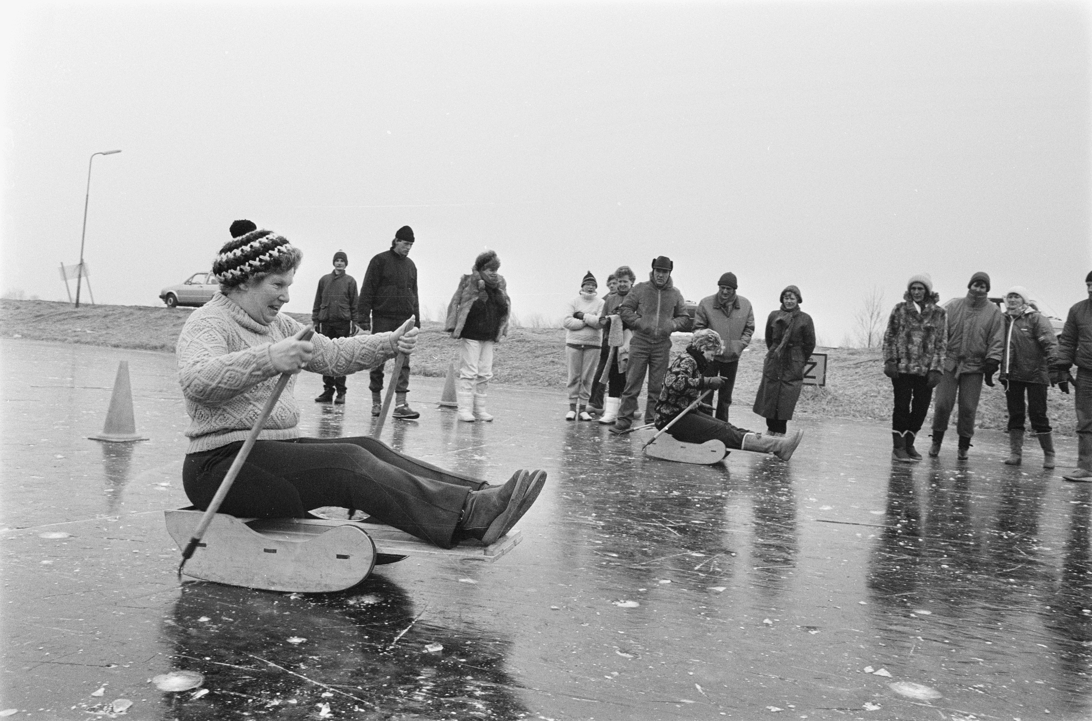 Collectie / Archief : Fotocollectie Anefo Reportage / Serie : [ onbekend ] Beschrijving : Oer-Hollands gebruik: priksleeën in Noord-Holland Datum : 16 februari 1986 Locatie : Noord-Holland Trefwoorden : ijs, kou, sleeën, winter Fotograaf : Croes, Rob C. / Anefo, [onbekend] Auteursrechthebbende : Nationaal Archief Materiaalsoort : Negatief (zwart/wit) Nummer archiefinventaris : bekijk toegang 2.24.01.05 Bestanddeelnummer : 933-5698